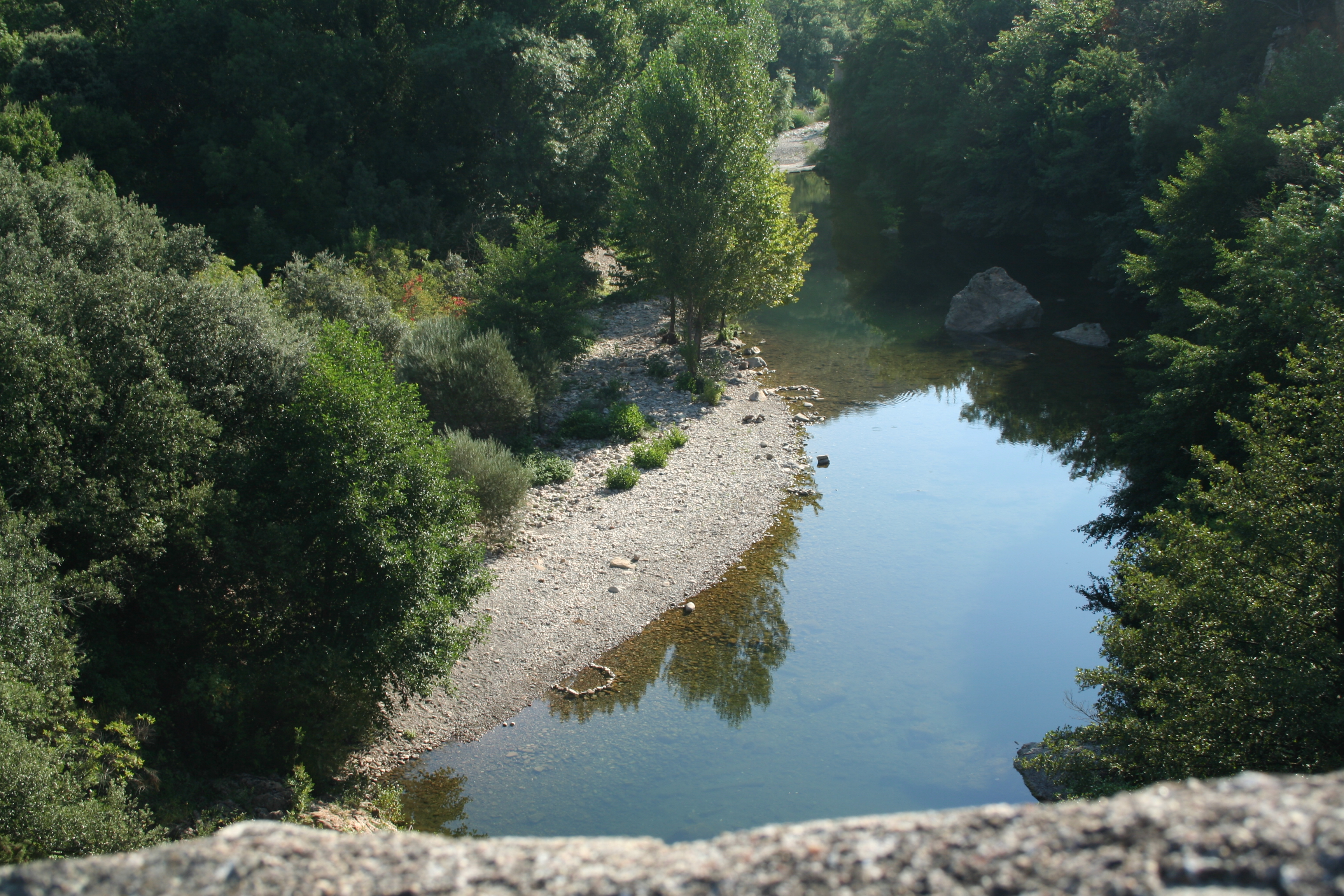 Villemagne-l'Argentière (Hérault) - la Mare vue depuis le Pont du Diable.